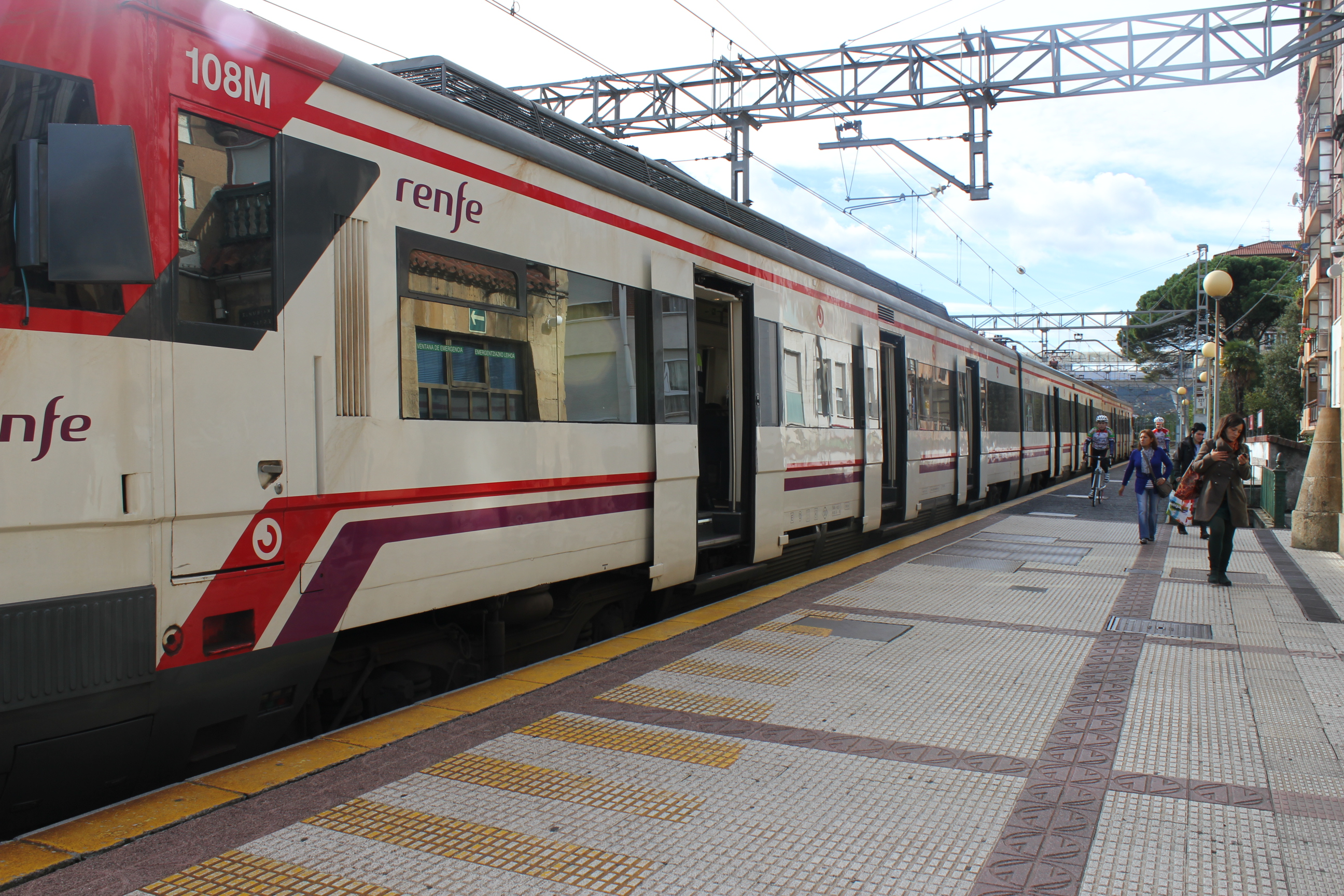 Cercanías en Llodio